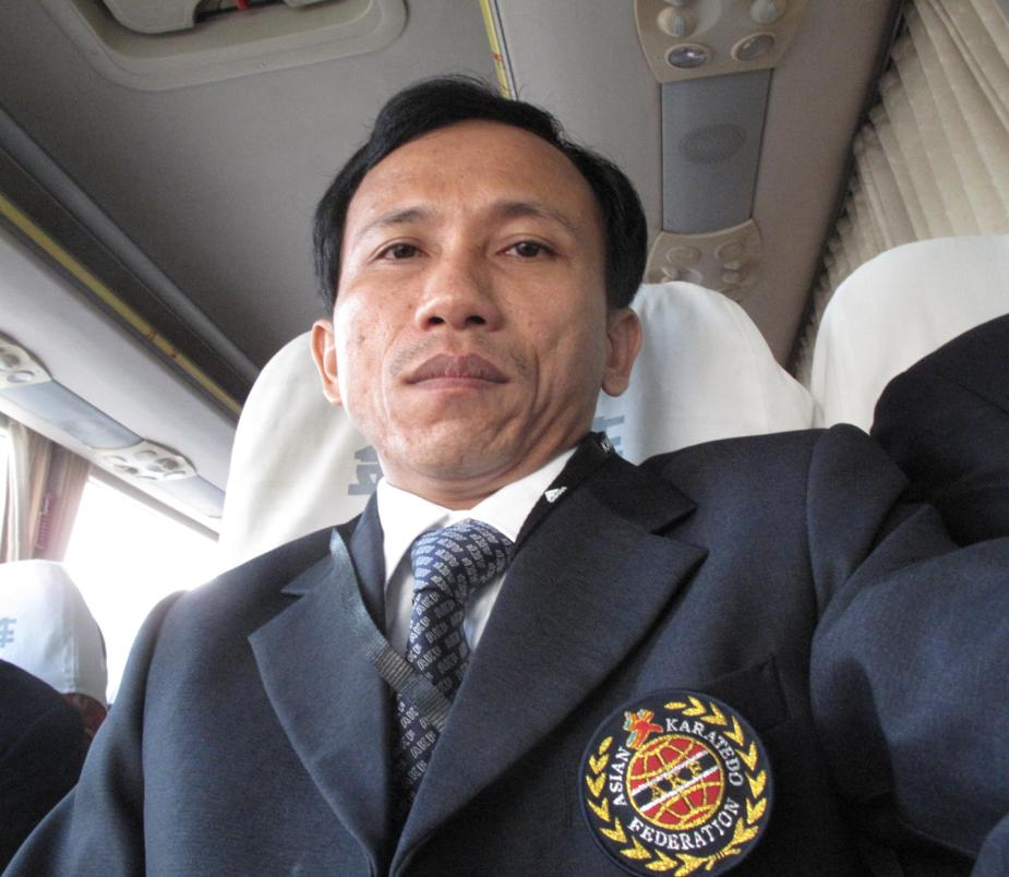 Võ sư Nguyễn Viết Hòa trọng tài Giải vô địch Karatedo châu Á 2011 (tổ chức tại Quảng Châu - Trung Quốc)